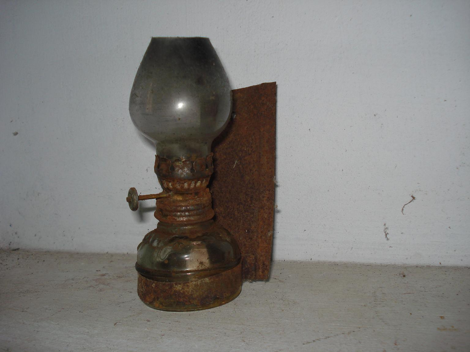 ചിമ്മിനി വിളക്ക് വൈദ്യുതി വീടുകളിൽ എത്തിചേരുന്നതിന് മുൻപ് മണ്ണെണ്ണ ഒഴിച്ച് കത്തിക്കുന്ന ചിമ്മിനി വിളക്കാണ് മലയാളികൾ ഉപയോഗിച്ചിരുന്നത്.